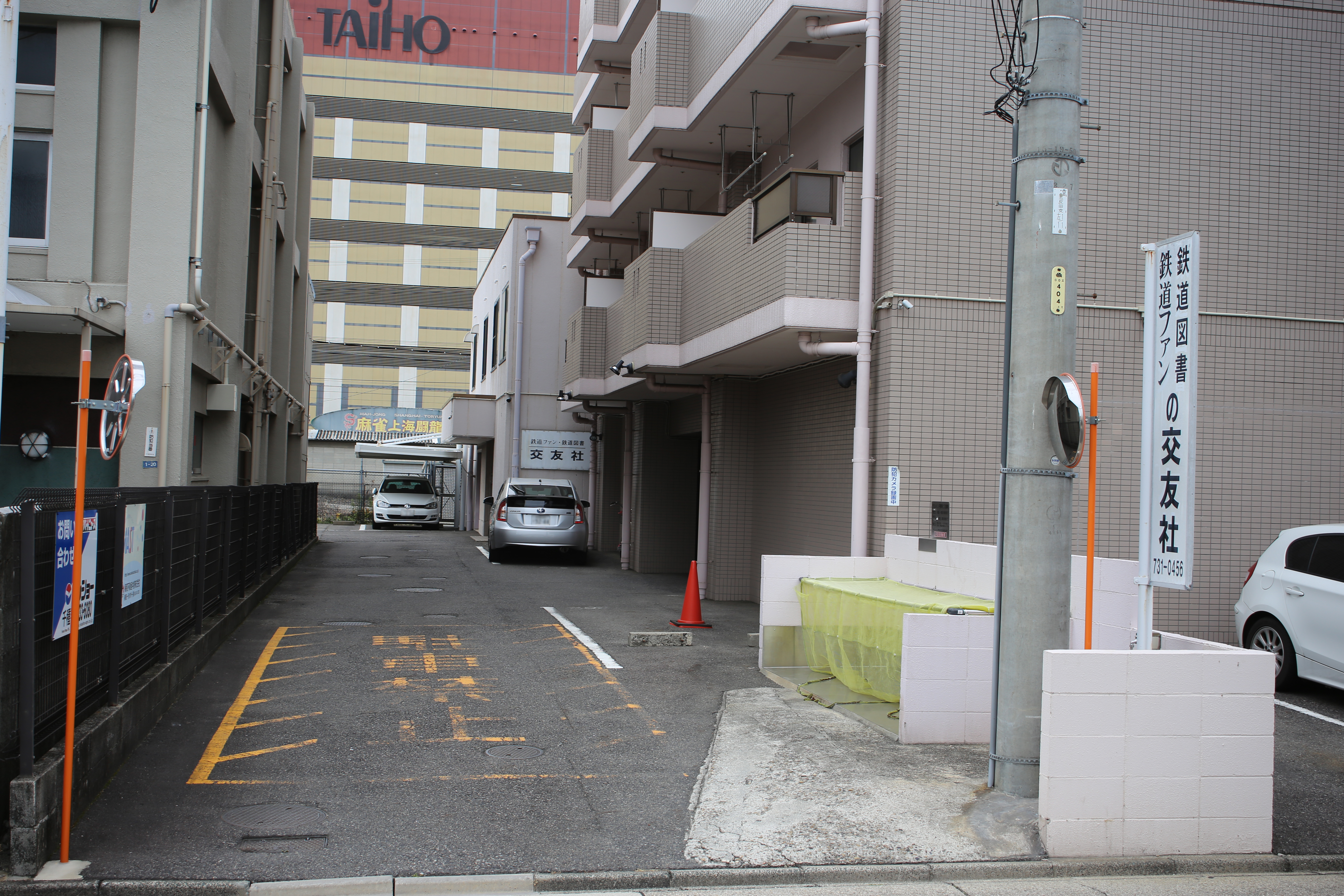 名古屋市千種区今池二丁目の交友社本社入口を東側公道より撮影